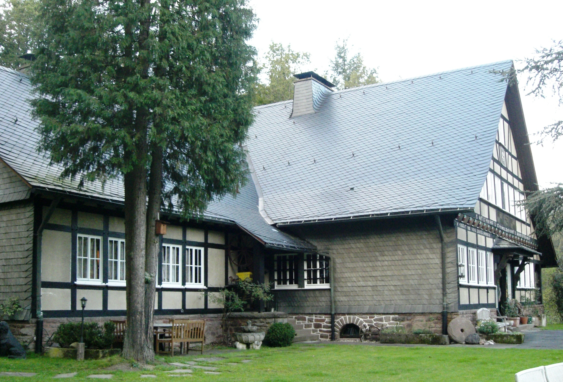 Im Jahr 1938 erbautes repräsentatives Wohnhaus; Erbauerin des denkmalgeschützten Hauses war die Heimatdichterin Josefa Berens - Totenohl